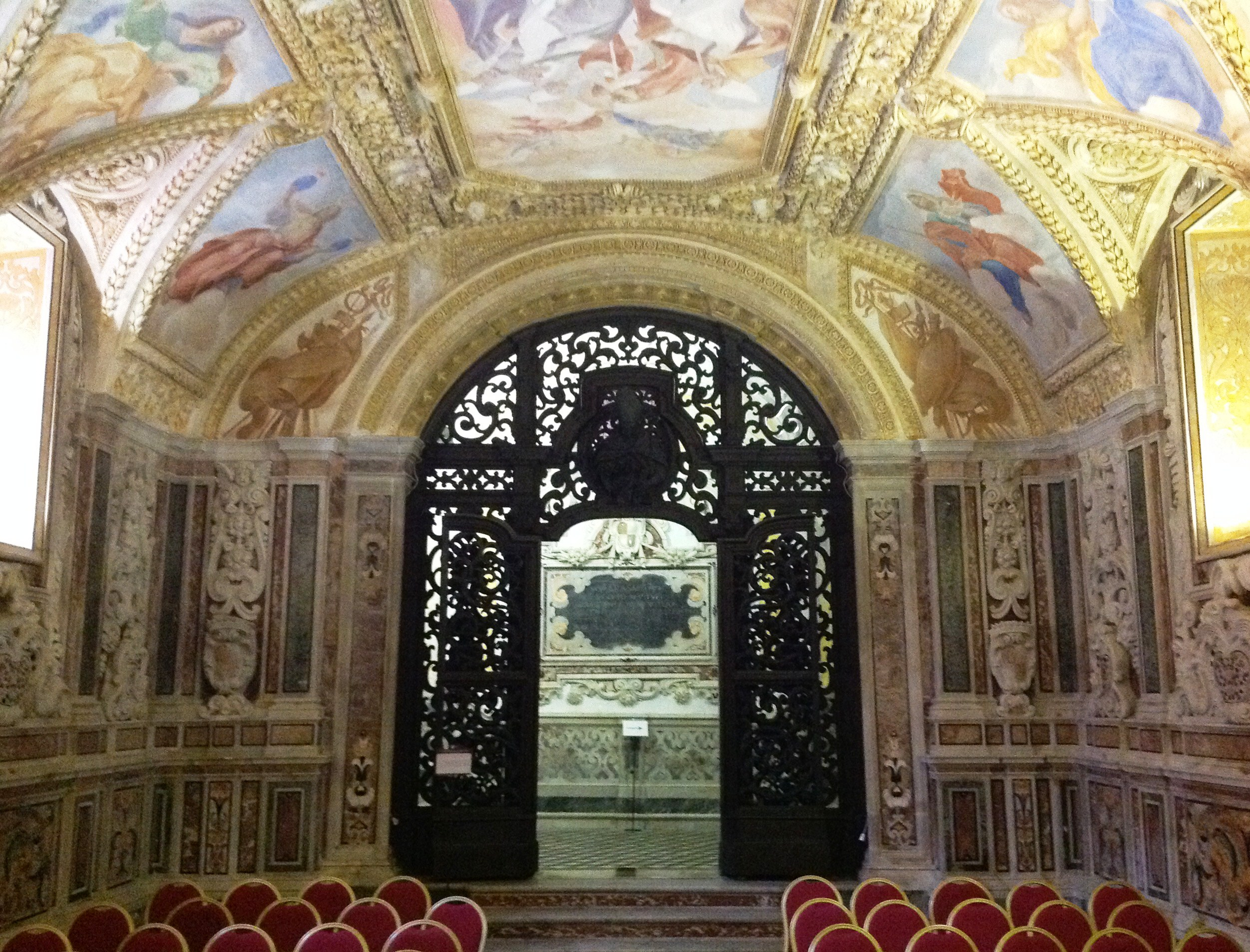 Veduta interna del succorpo verso l'ingresso.